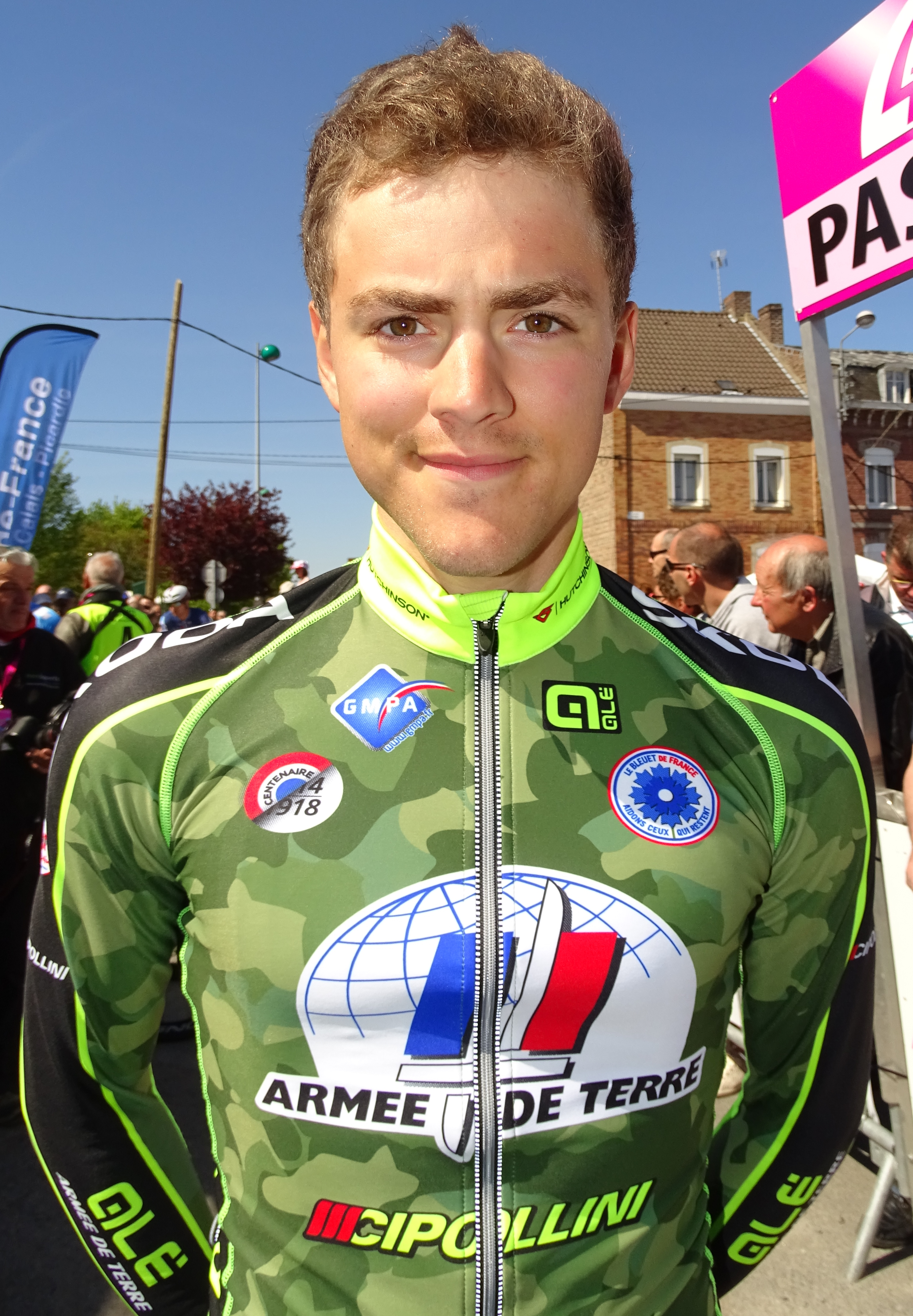 Reportage réalisé le jeudi 5 mai 2016 à l'occasion du départ et de l'arrivée de la deuxième étape des Quatre jours de Dunkerque 2016 à Aniche, Nord, Nord-Pas-de-Calais, France. Depicted person: Yannis Yssaad Depicted team: Armée de Terre